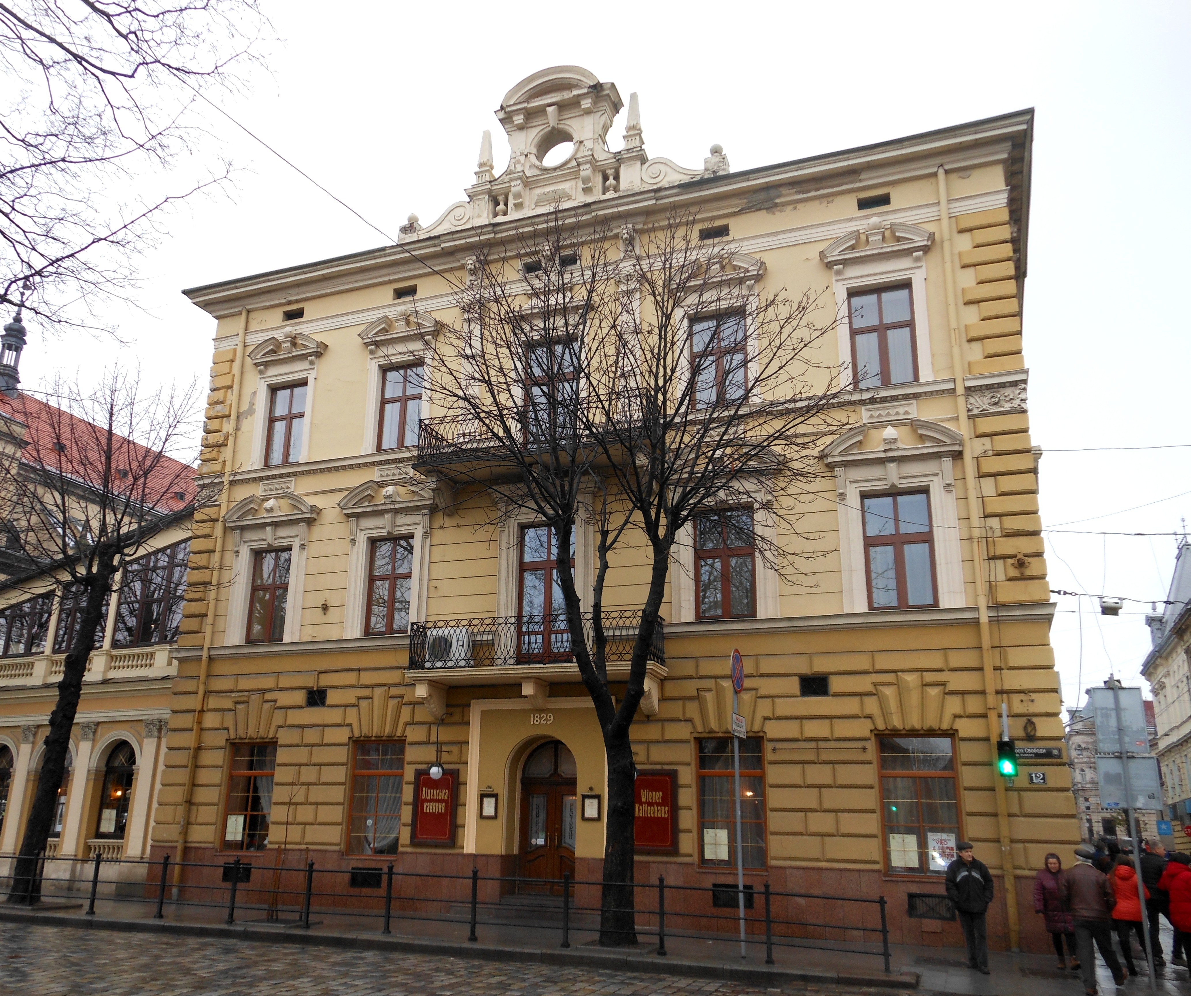 адміністративний будинок, Львів, Свободи пр., 12